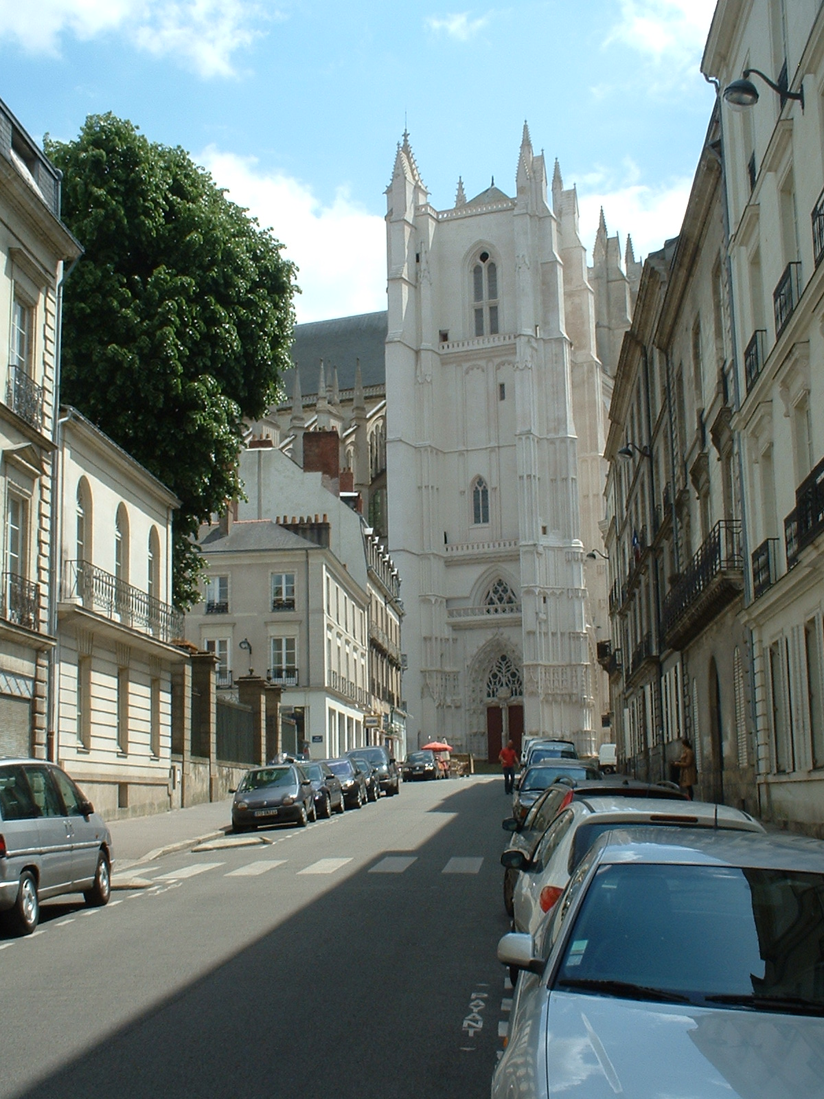 Nantes (France) - rue du roi Albert